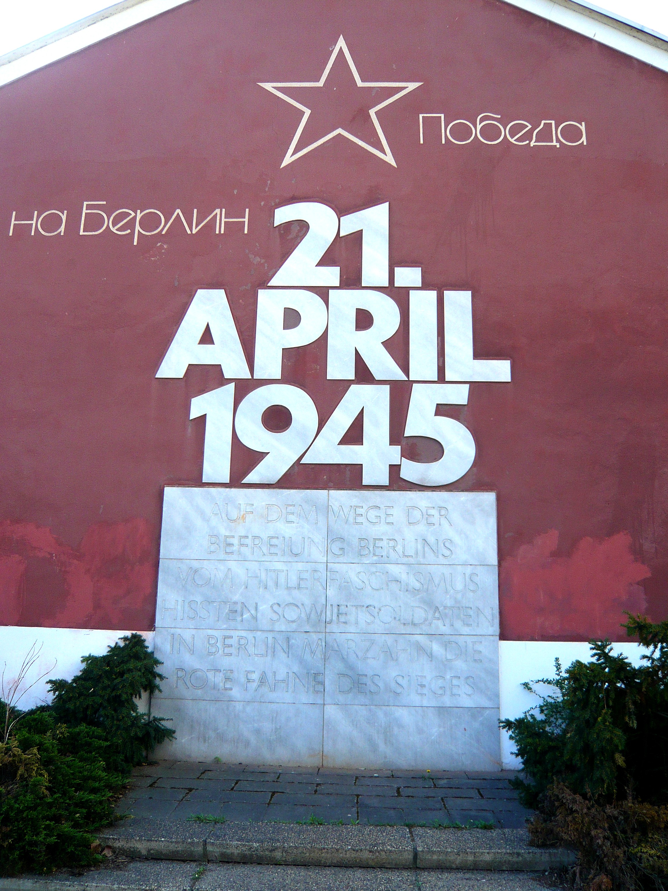 Ortsteil Marzahn: Landsberger Allee Nummer 563: Baudenkmal/ Denkmal